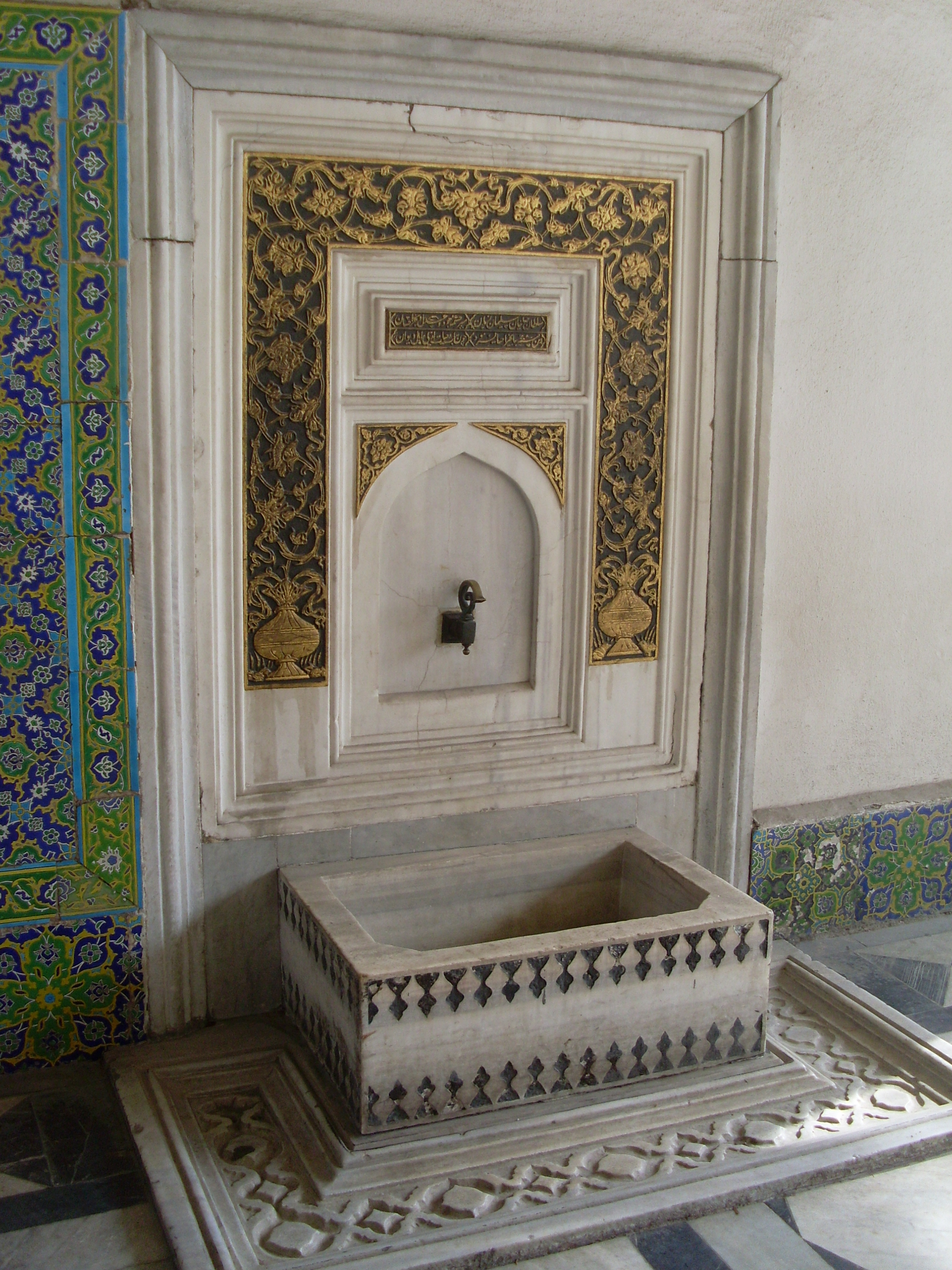 Fuente, Palacio de Topkapi, Estambul, Turquía, abril de 2011